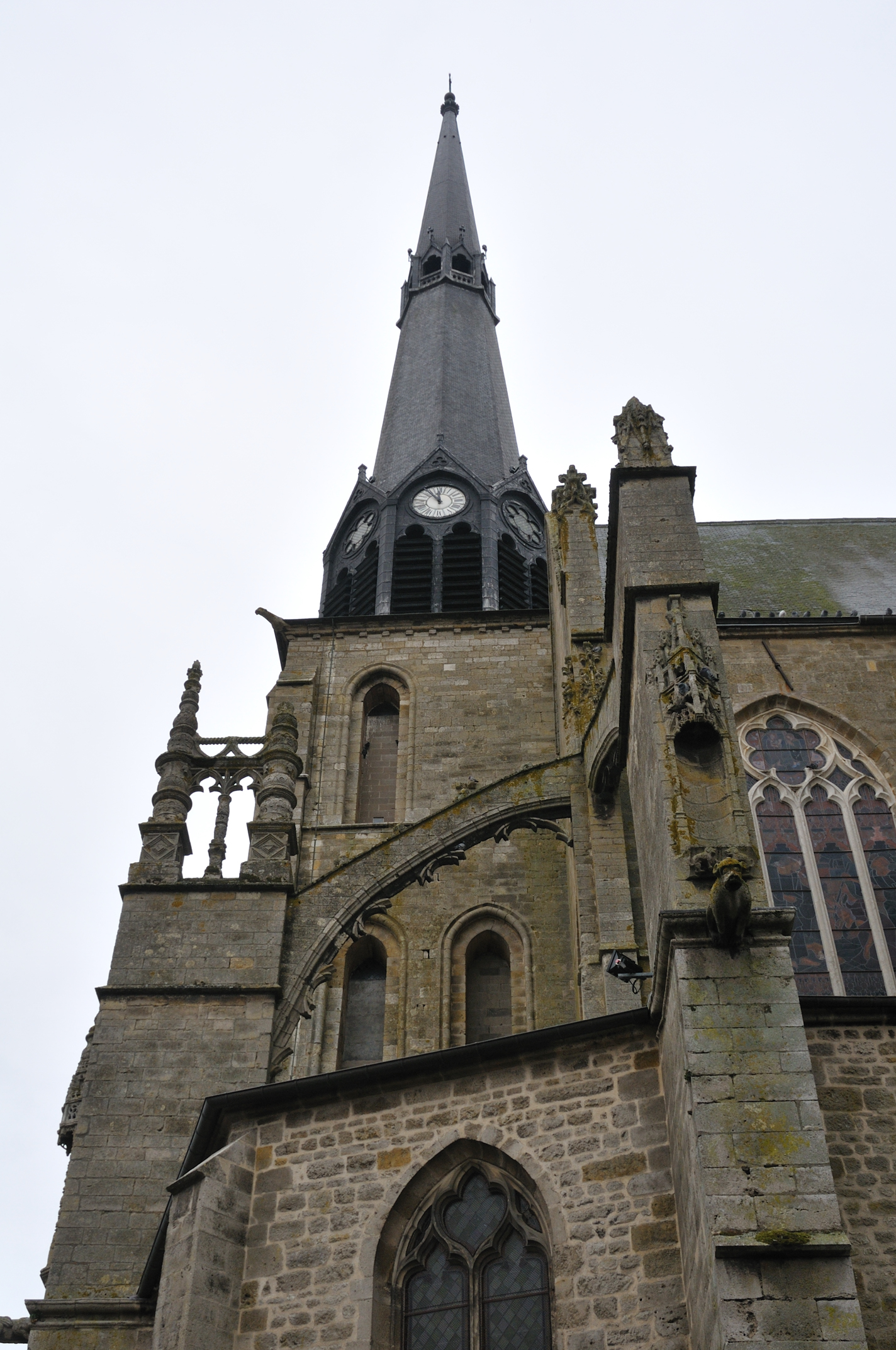 Église Saint-Salomon et Saint-Grégoire, Pithiviers, Loiret, France